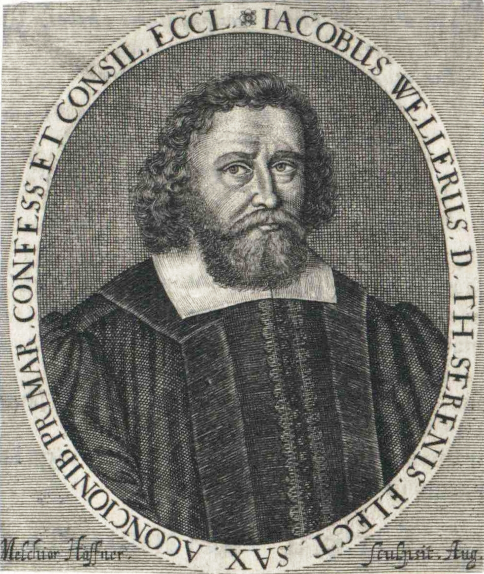 Jakob Weller (1602–1664), deutscher evangelischer Theologe. Kupferstich